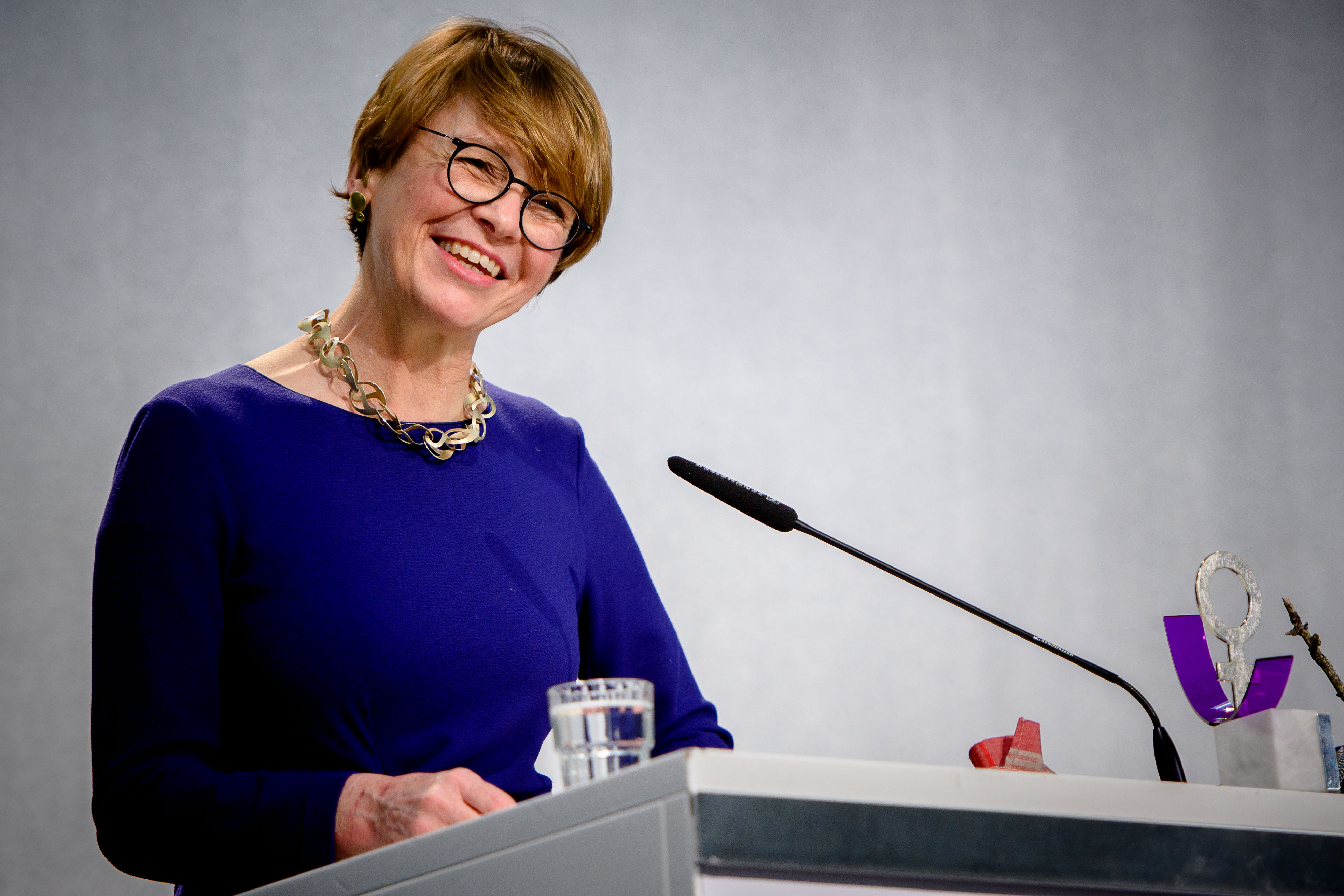 Elke Büdenbender (Juristin, beurlaubte Richterin am Verwaltungsgericht, Ehefrau des Bundespräsidenten Frank-Walter Steinmeier) Foto: Stephan Röhl